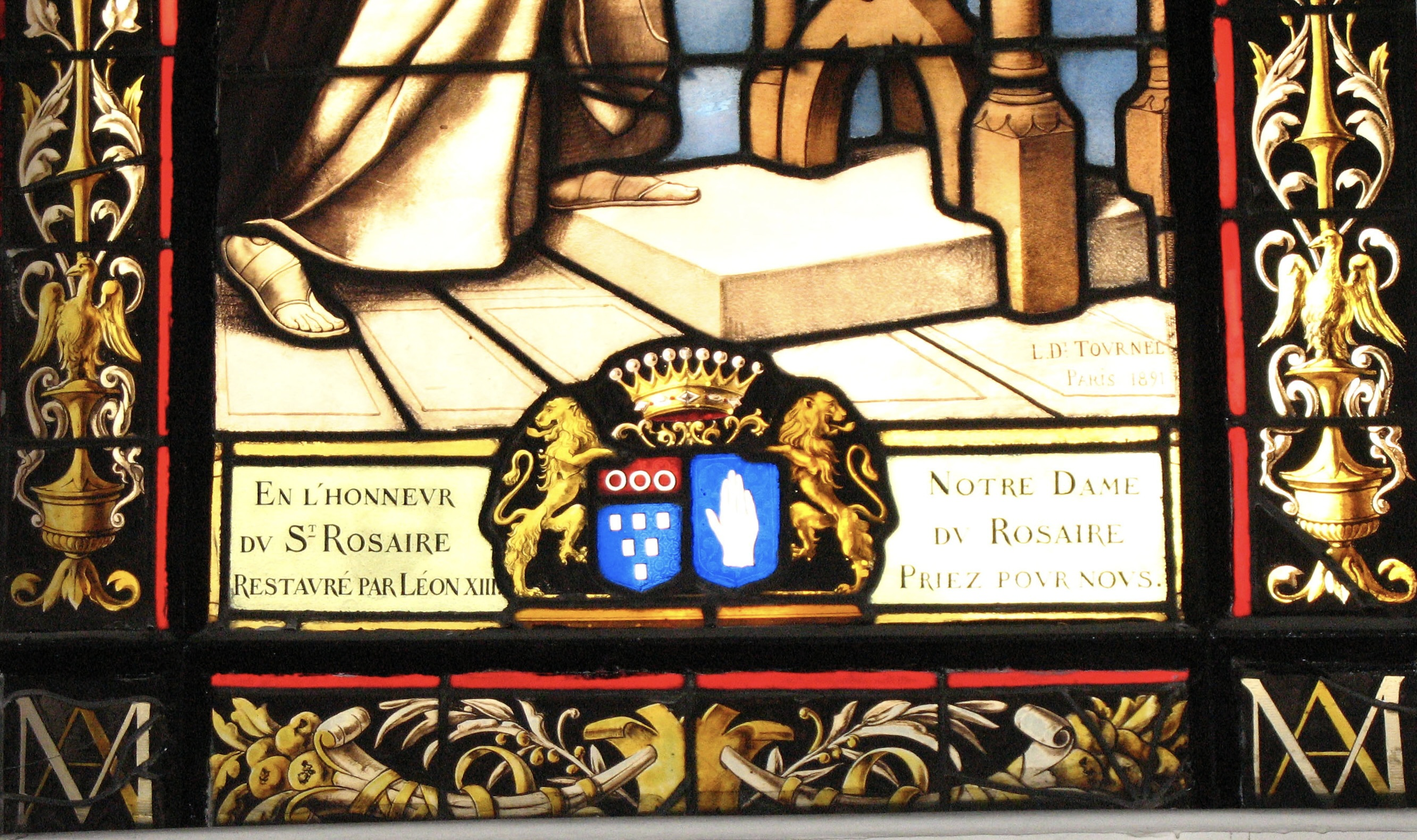 Photographie d'une portion d'un vitrail réalisé par Léon Tournel Maître Verrier à Paris. Vitrail situé dans l'église de la Celle Saint-Cloud (St Pierre-St Paul)